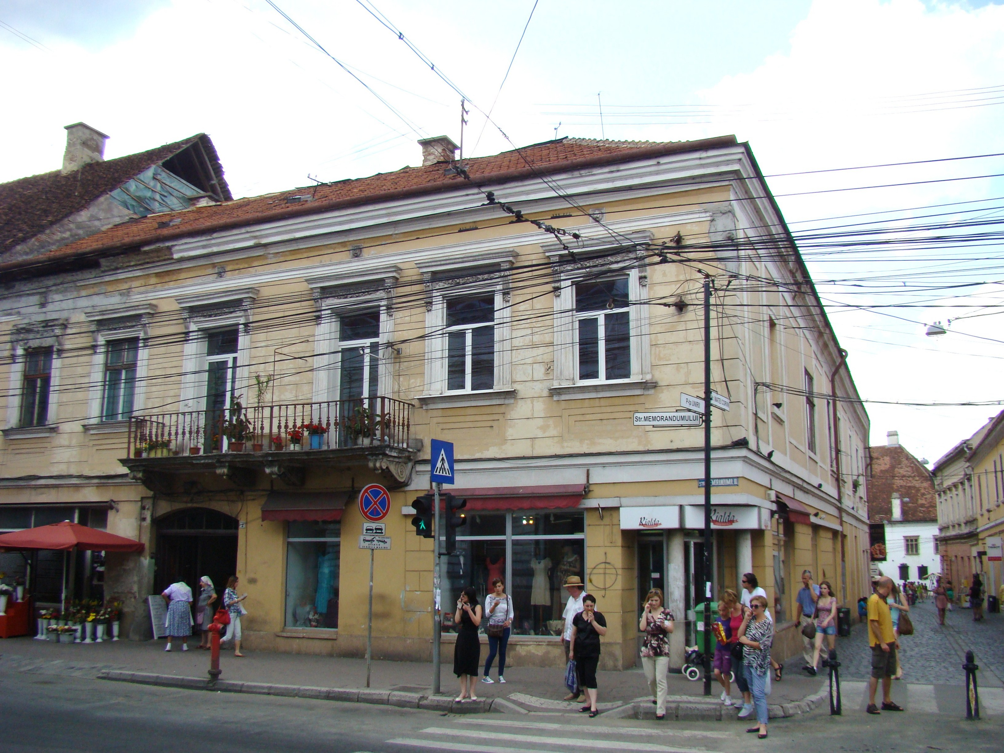 Clădire monument istoric: Str. Matei Corvin 1 și str. Memorandumului nr. 2